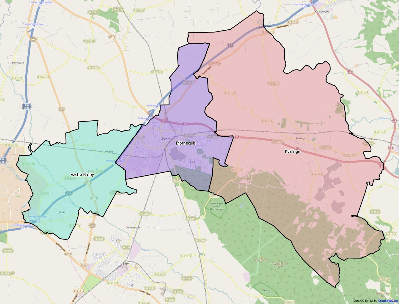 Distriktsindelningen i Åstorps kommun World file 24.2099664503142229 0 0 -24.2099664503142229 1427665.87984033231623471 7596665.47676518745720387